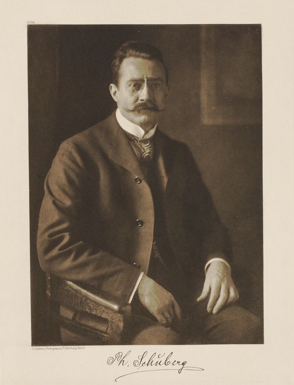 Philipp Schuberg. Foto.